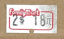 1990年代全家便利商店商品價格標籤貼紙。